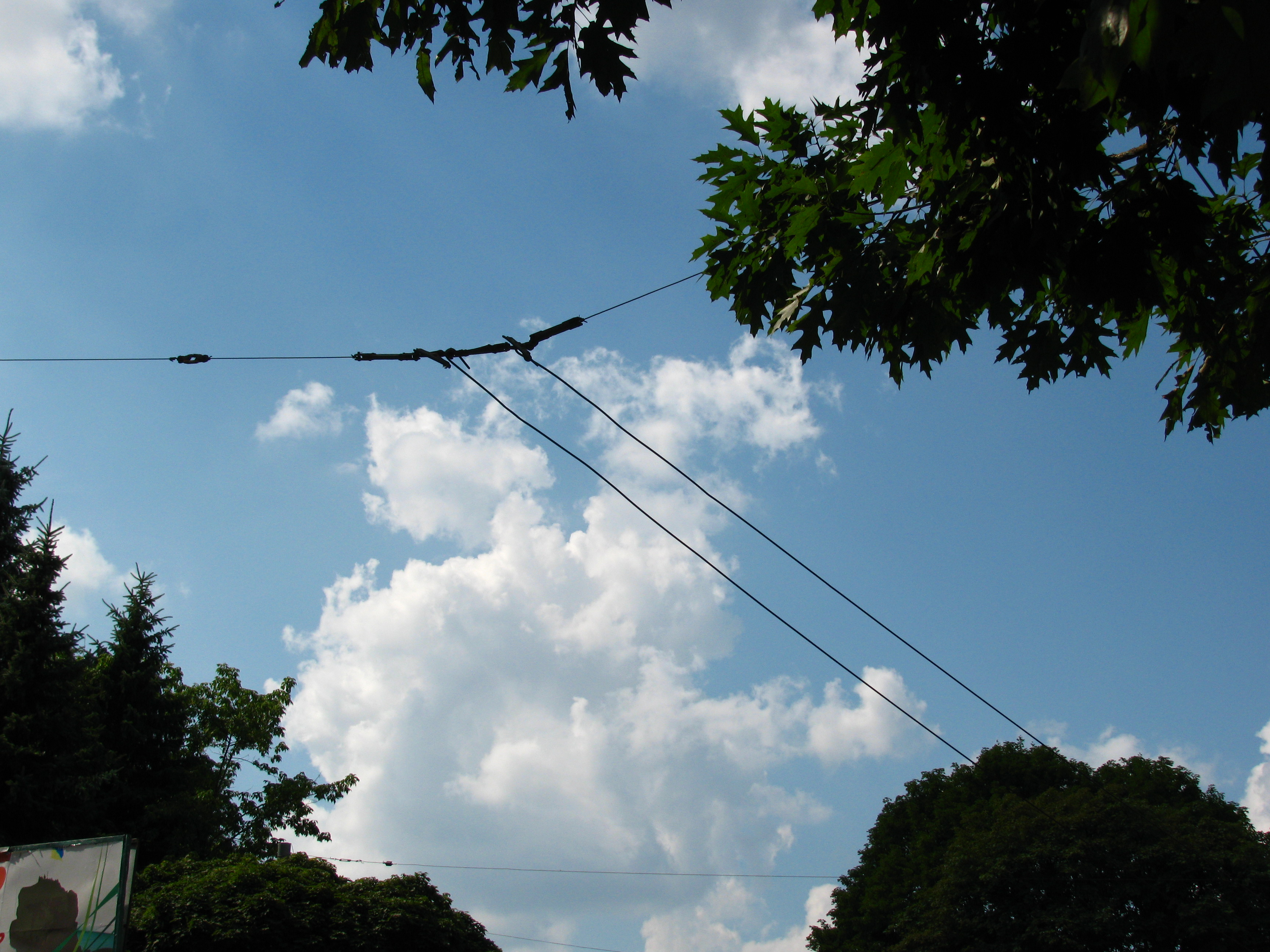 Обірвана тролейбусна лінія на вулиці Снопківській у Львові